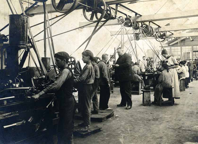 Errenteriako Niessen enpresaren antzinako tailerren bista (Gipuzkoa). Guillermo Niessen eta bere emazte Juana Schmidt langileekin hizketan